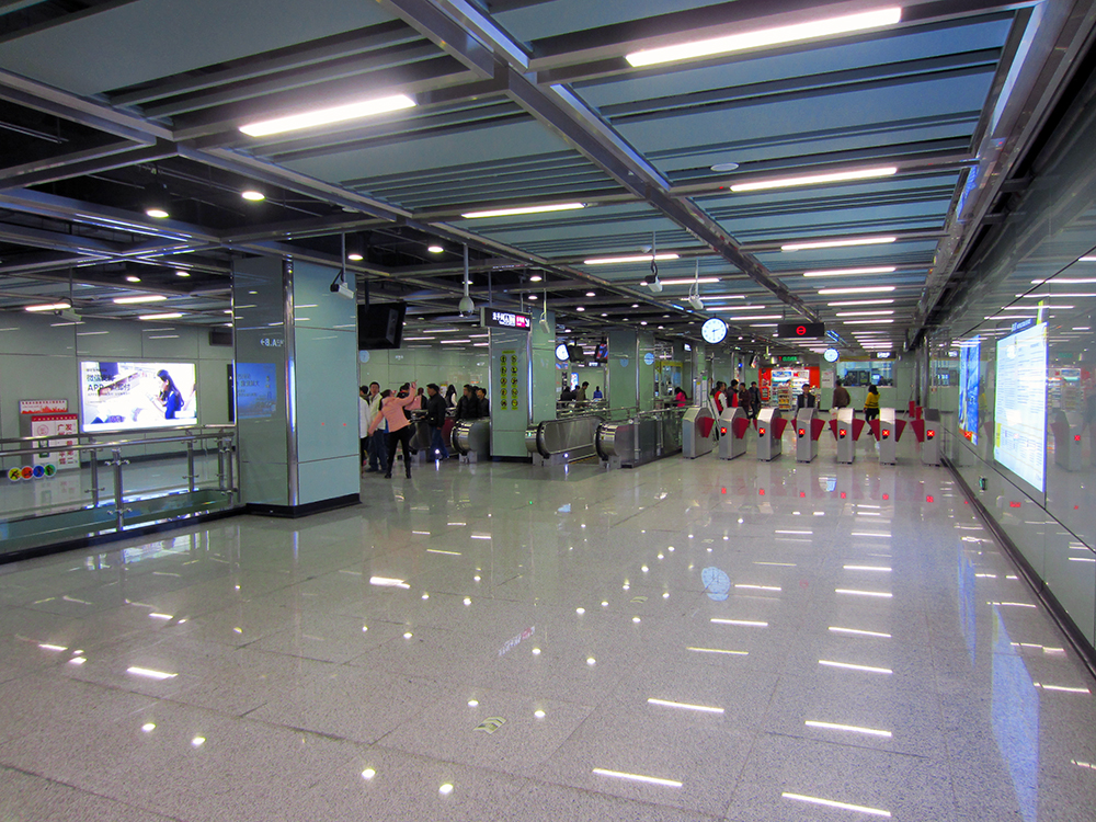 沙河頂站站廳